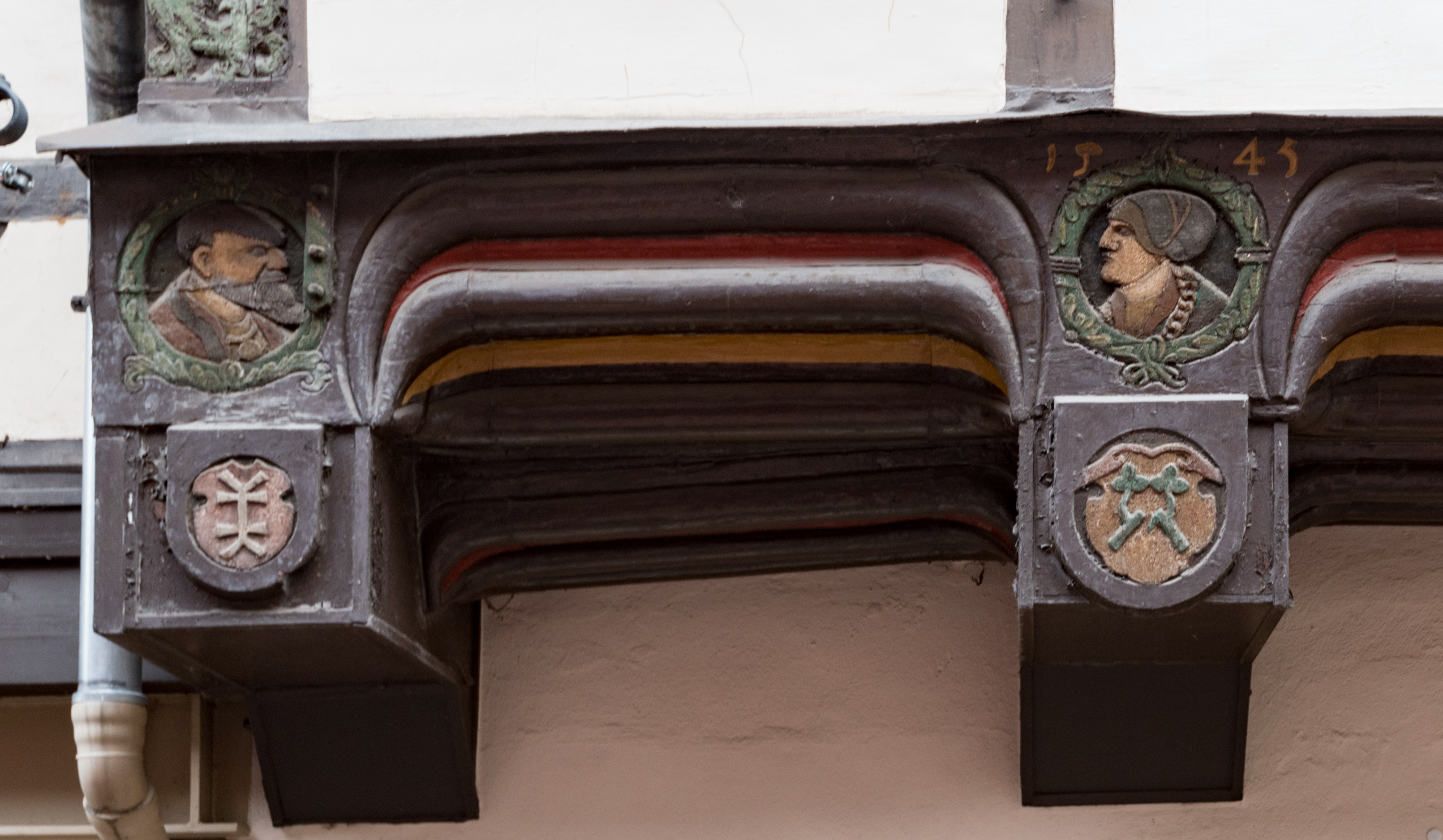 Göttingen, Johannisstraße 6